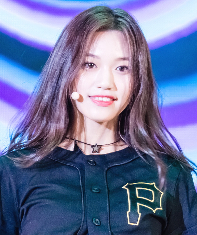 청페 세정 도연 채연 나영 미나